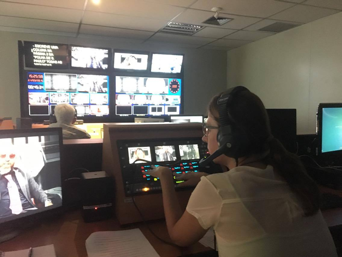 Foto tirada na Tv Gazeta no mês de março de 2016.